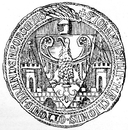 Johann III., „der Prager“ (1244–1268)